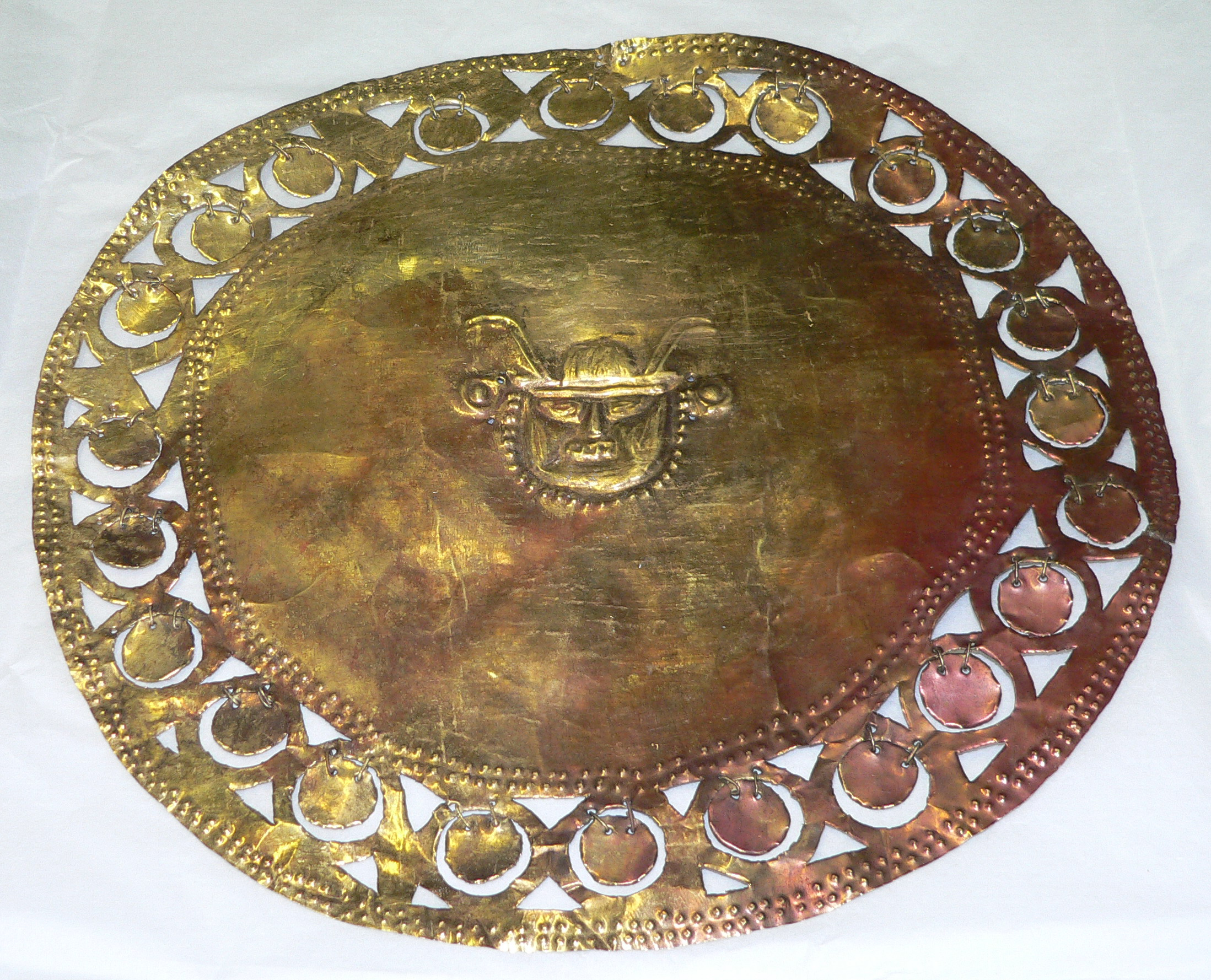 Adorno discoidal de metal dorado de la Cultura Lambayeque. Foto con © tomada por Manuel González Olaechea y Franco.